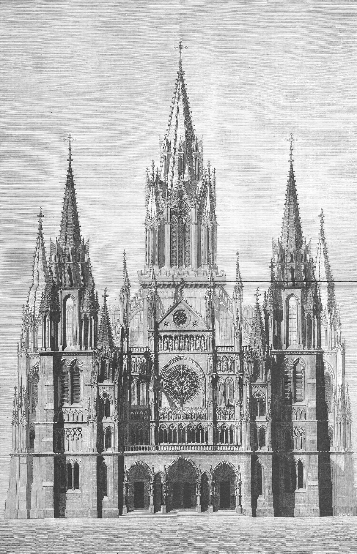 Fachada del proyecto original (no realizado) de la catedral de la Almudena de Madrid, en la revista española La Ilustración Española y Americana.